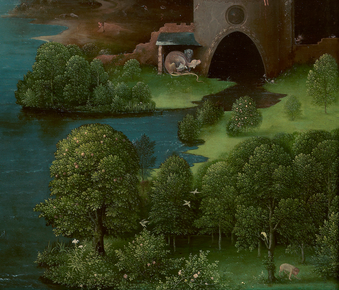 Joachim Patinier, Passage du Styx, détail : les limbes